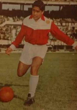 Martín Canseco, con la camiseta de Argentinos Juniors.